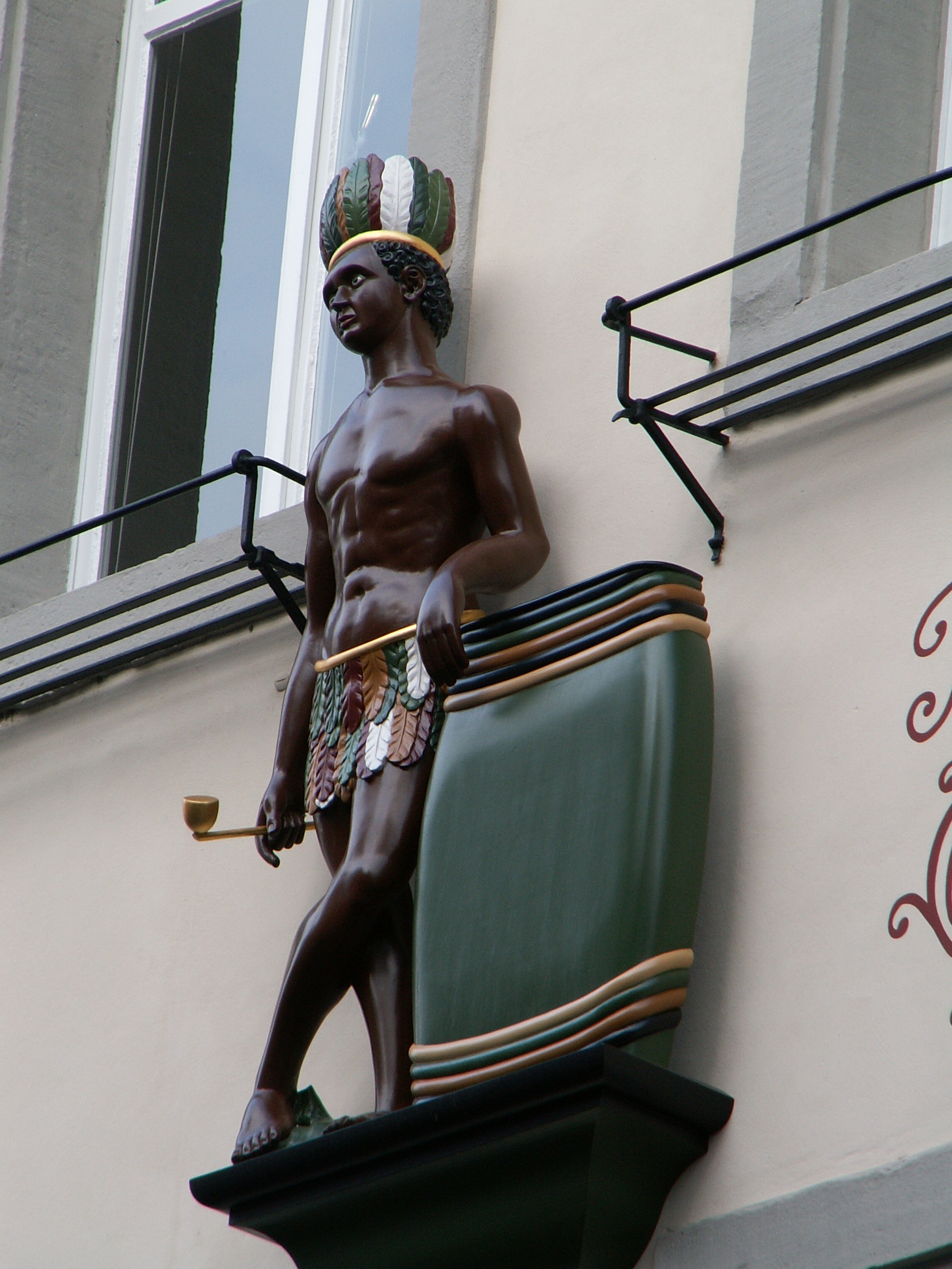 Bonn, Beethovenhaus: Detail Museumsshop